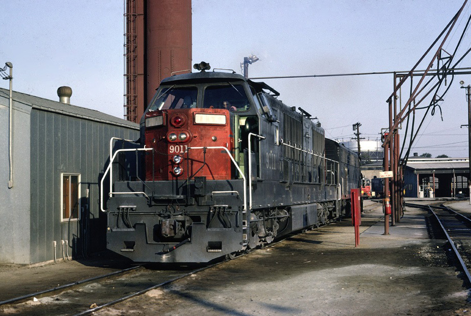 9011 at Lenzen St., San Jose. Aug 64